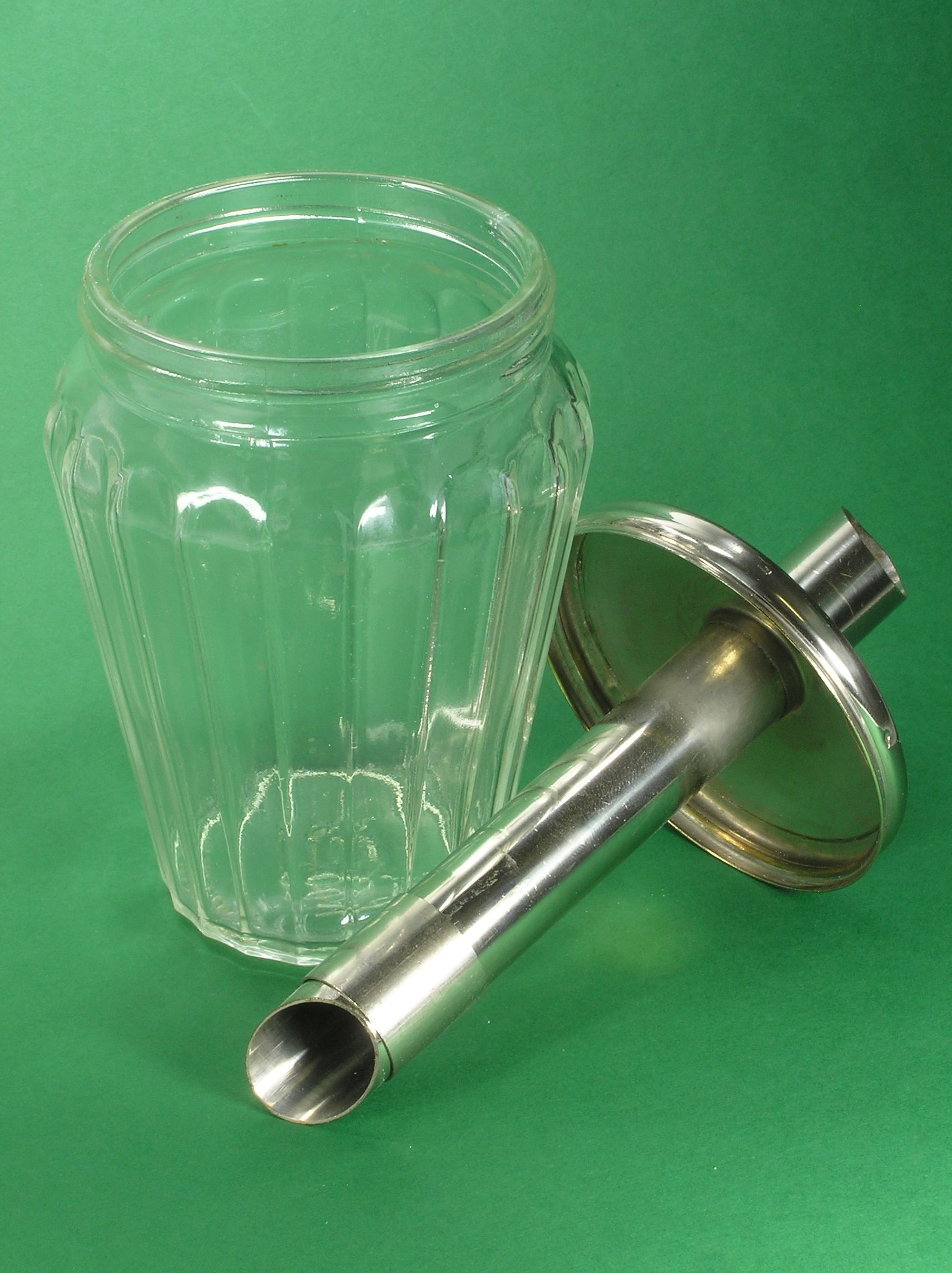 Zuckerstreuer "süßer Heinrich" der Firma Hely